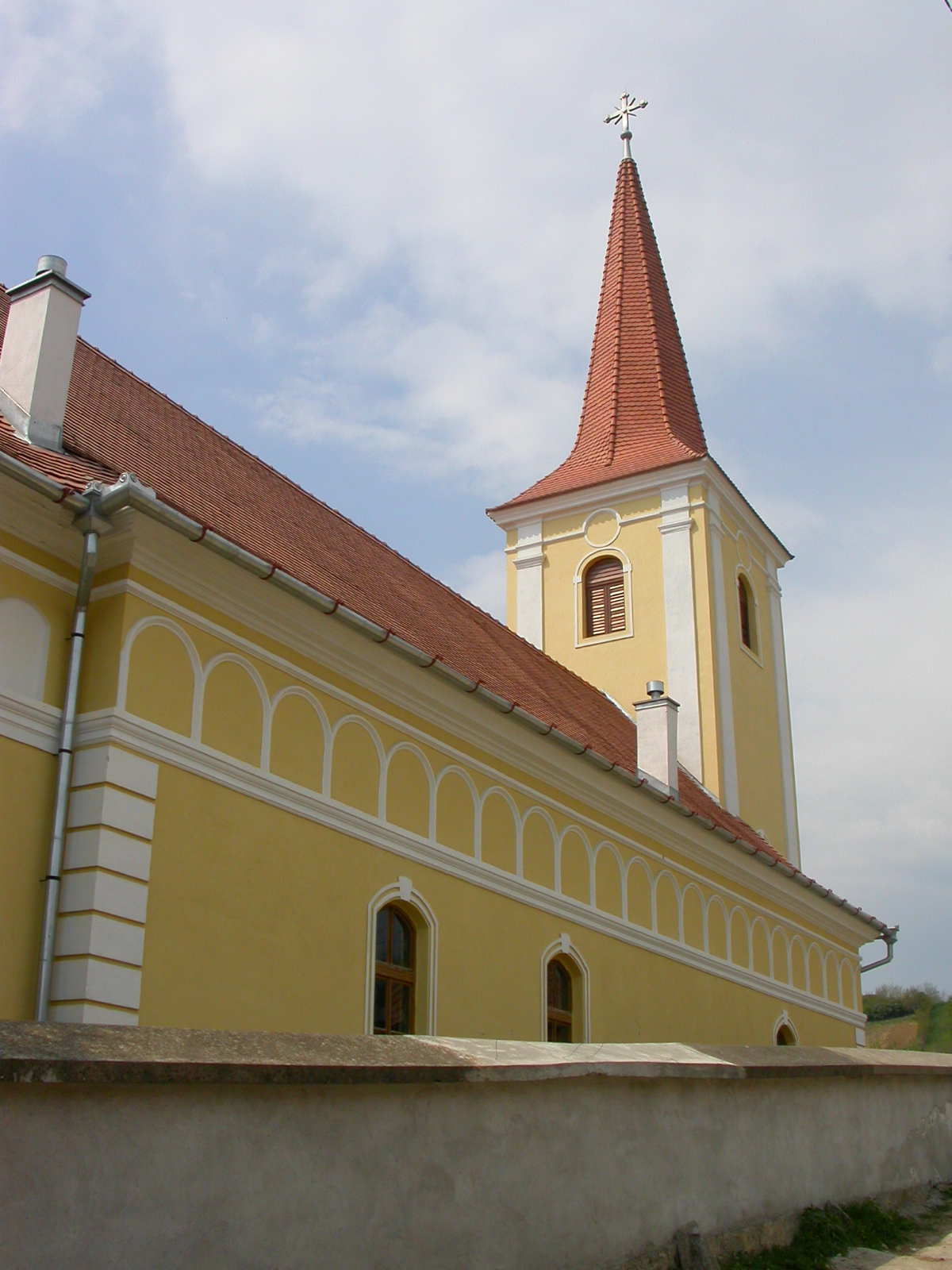 Biserica "Sf. Ioan Botezătorul"-Din Sus, sec. XVIII,1810 01